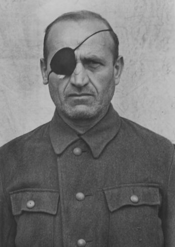 SS-Sturmbannführer Otto Förschner (4.11.1902 in Dürrenzimmern - 28.5.1946 in Landsberg)ab Februar 1942 Kommandeur des Wachsturmbanns des Konzentrationslagers Buchenwald, ab September 1943 Lagerkommandant des Konzentrationslagers Mittelbau-Dora; am 13.12.1945 zum Tode verurteilt und am 28.5.1946 hingerichtet." (Bildunterschrift beim Onlineauftritt der Gedenkstätte)